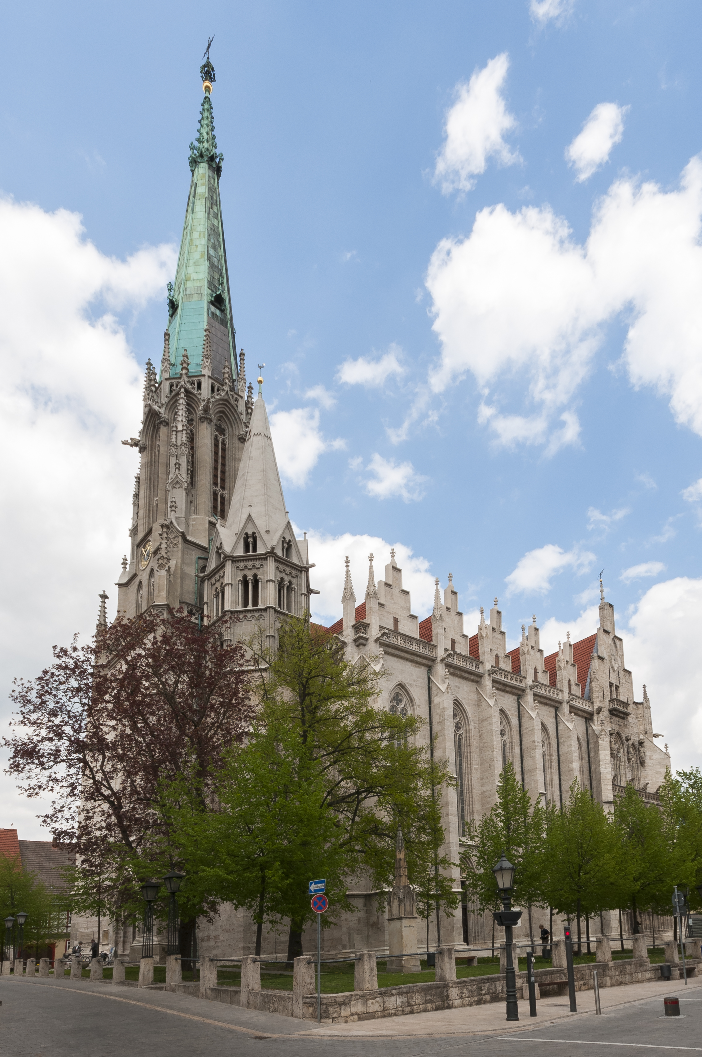 St. Marien-Kirche in Mühlhausen (Thüringen)